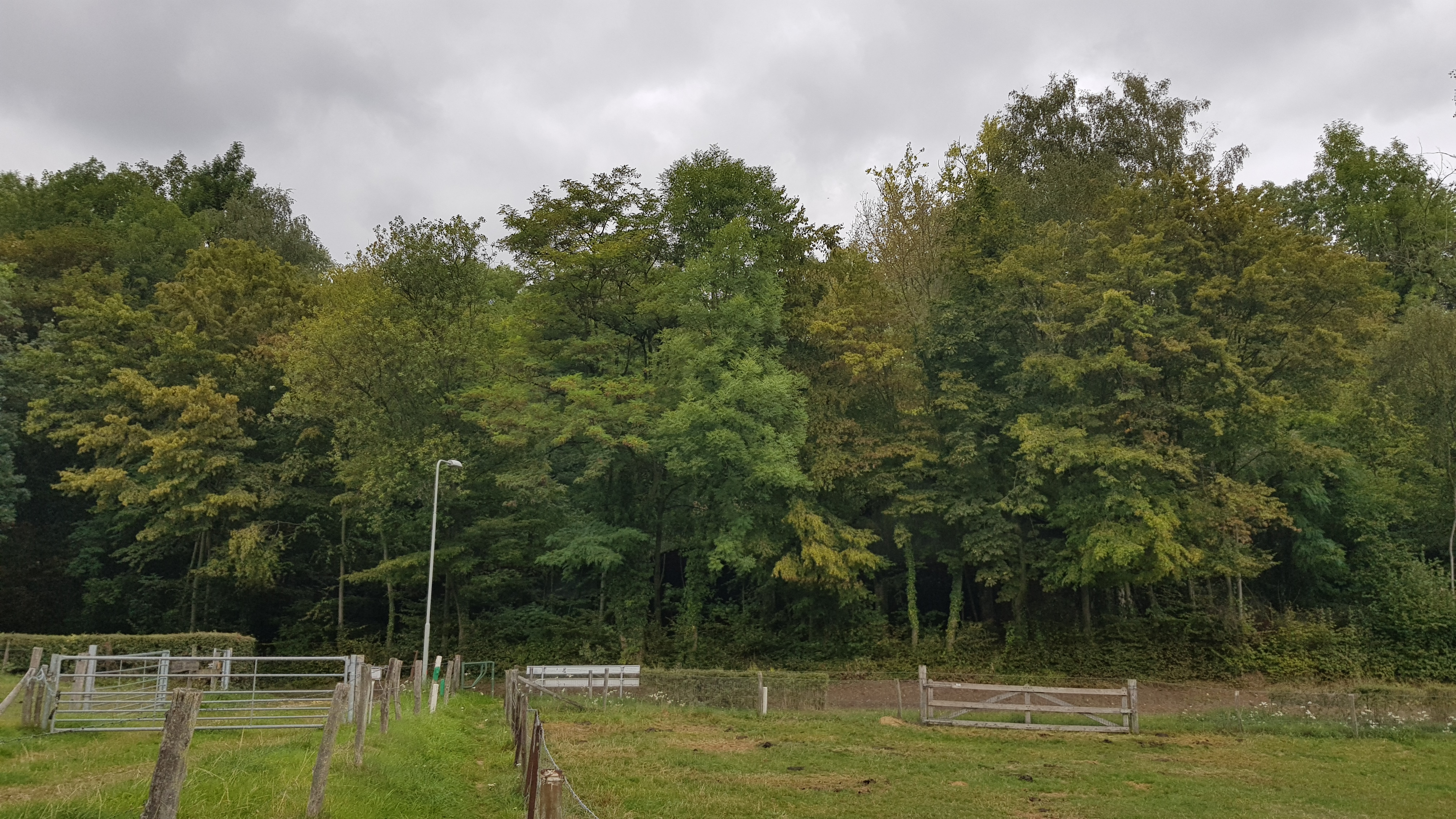 Kalkovens Kurvers, Ubachsberg, Nederland